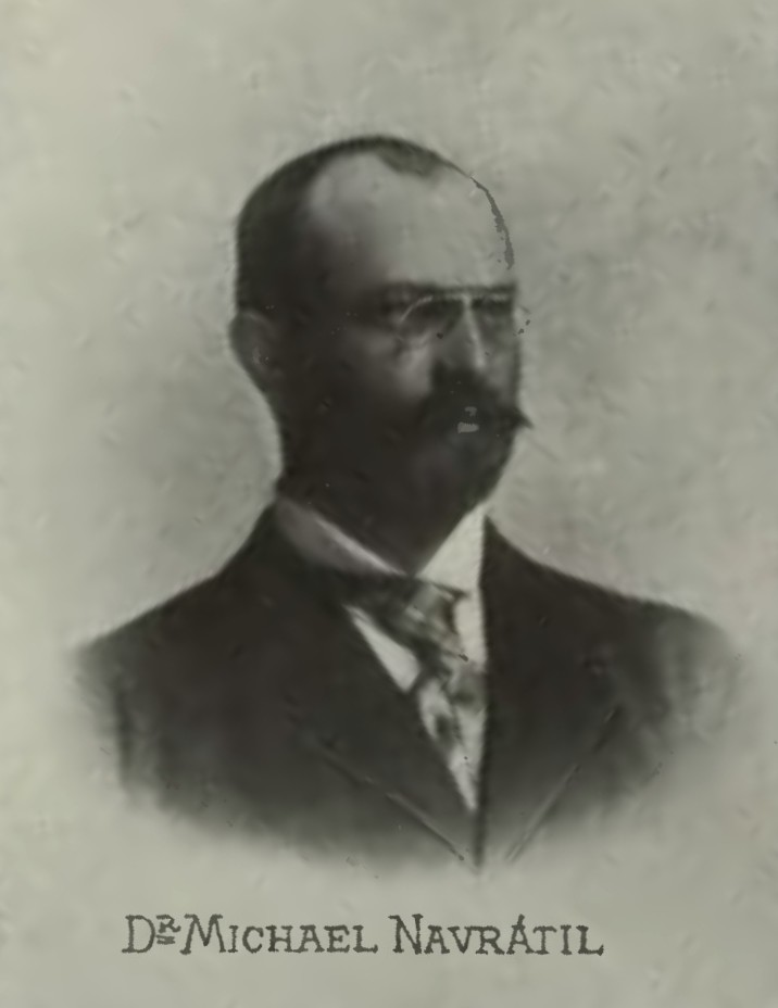 Portrét – Michal Navrátil (1861 - 1931), Český právník a spisovatel.